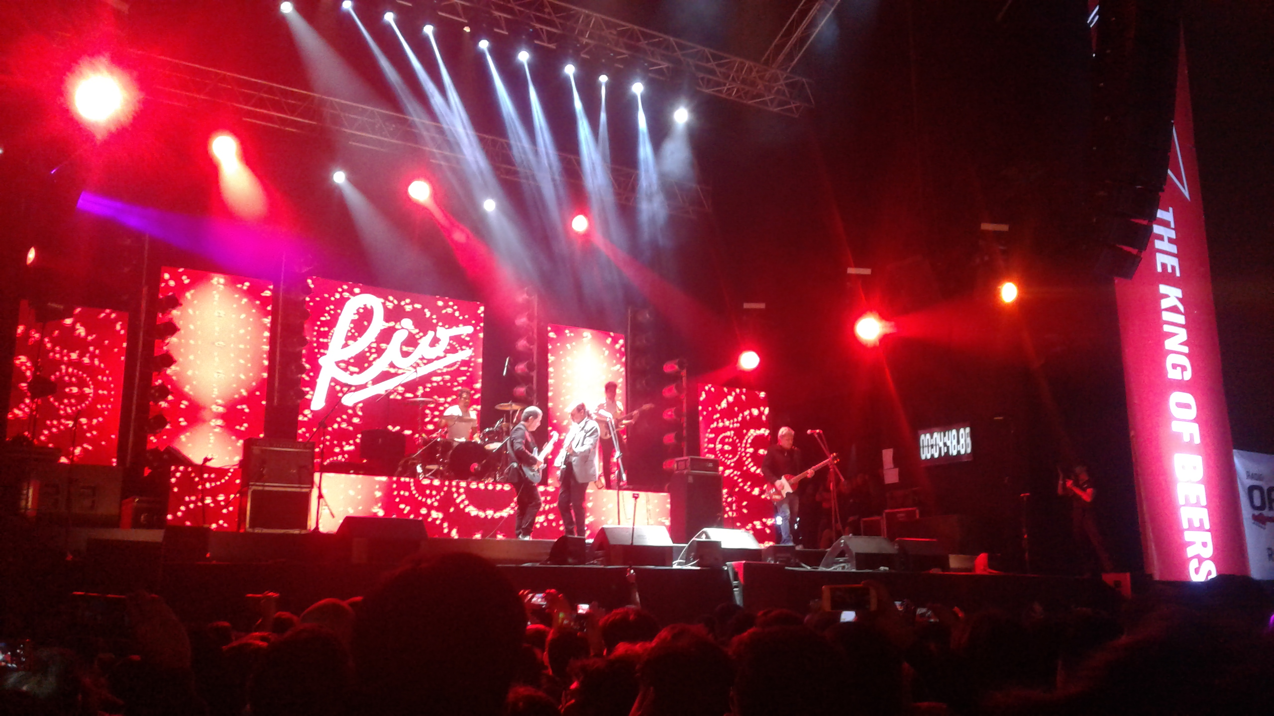 Rio tocando "Princesa".